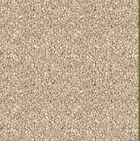 „Tip Definition“ eines Teppichs